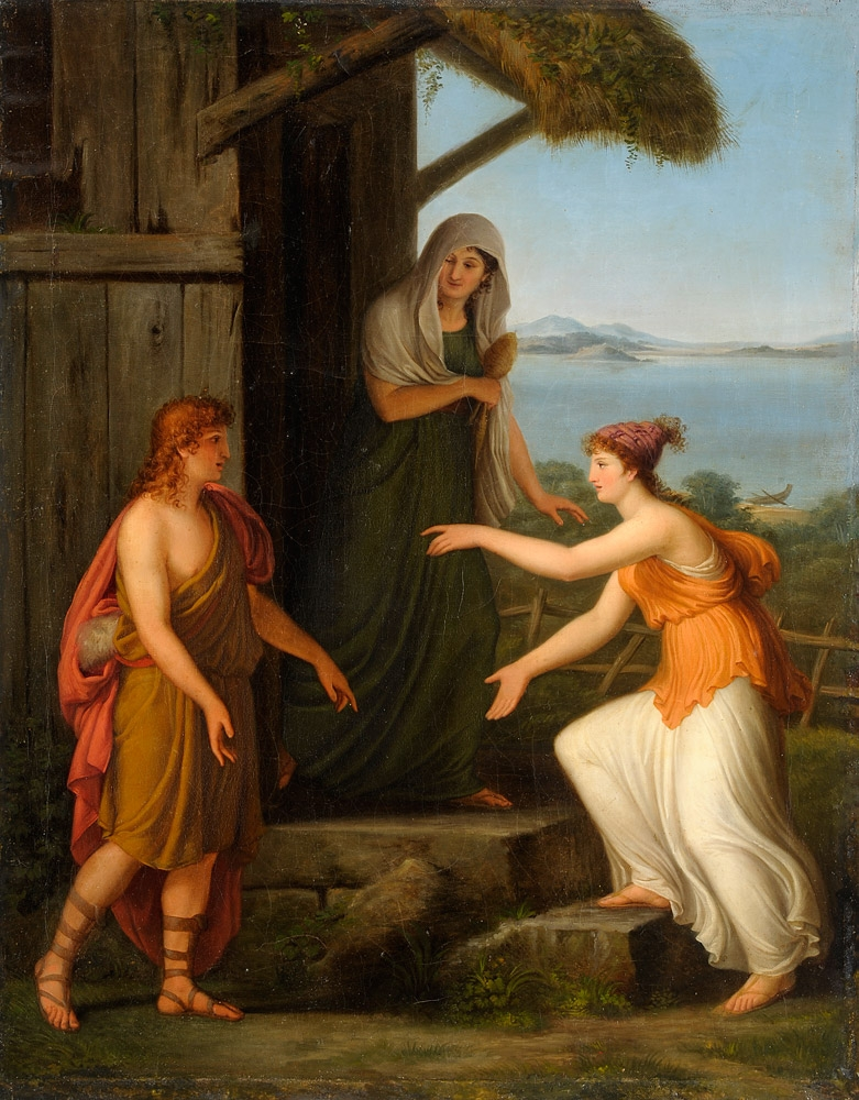 Eines von zwei Gegenstücken mit mythologischen Szenen. Ein Gemälde davon signiert und datiert: Roma 1806. Öl/Lwd., 62 x 49,5 cm bzw. 62 x 48 cm.